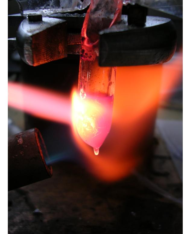 Feinstes Rhodiumpulver (Rhodiumschwamm) wird zwecks Weiterverarbeitung und Reinigung in einem gluehend heissen Alkaliemetallsalzbad geloest (Bild: Alexander C. Wimmer)